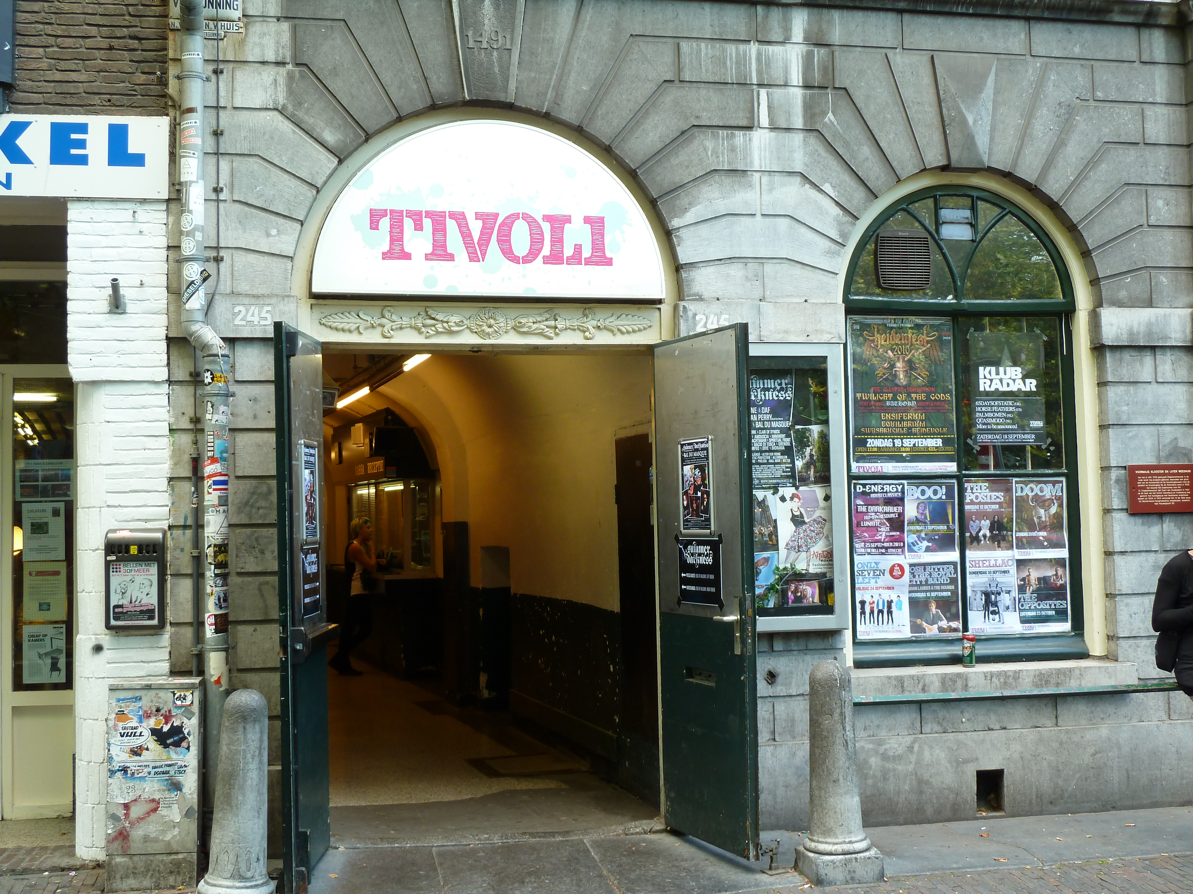 Ingang van Tivoli aan de Oudegracht 245, voormalig NV-huis, voormalig klooster